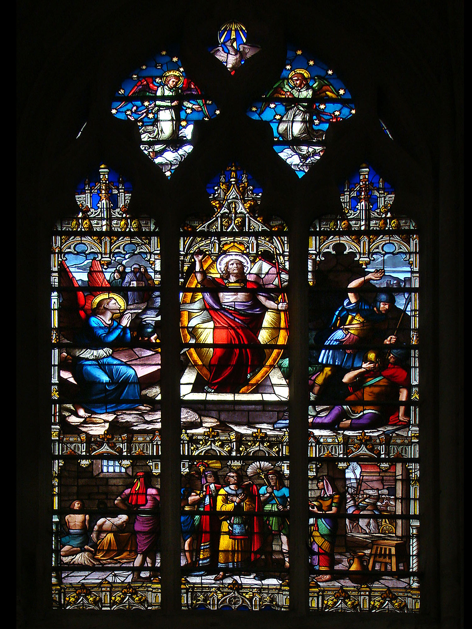 Notre-Dame de Senlis, Oise, Picardie, France.